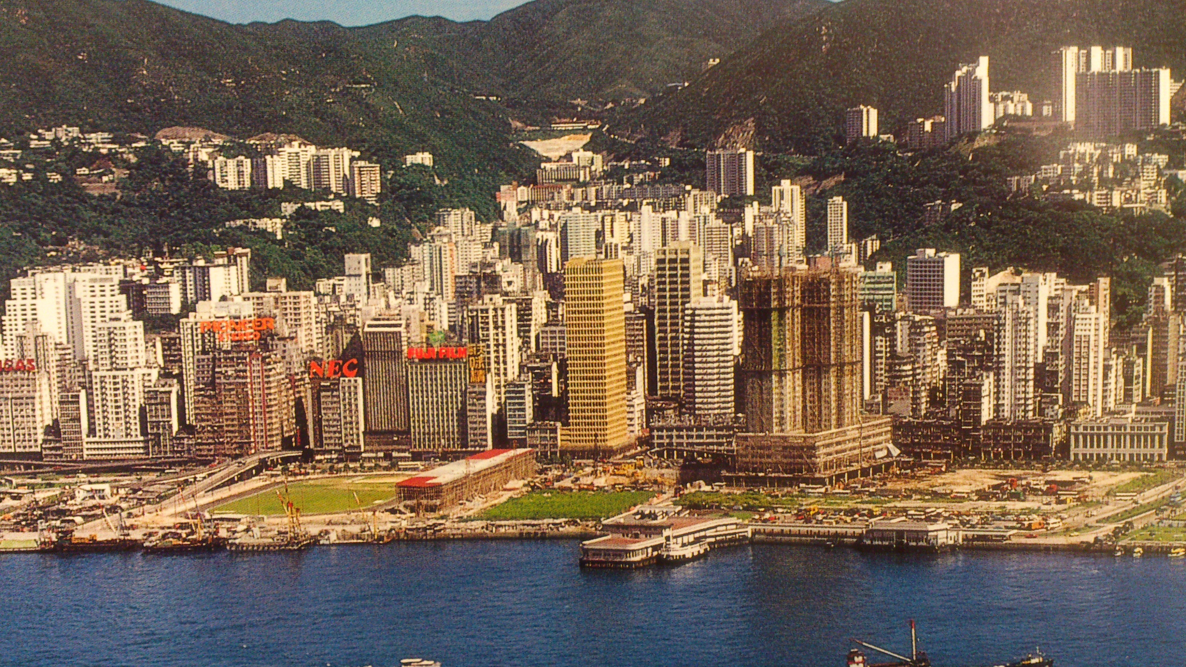 Admiralty, Hong Kong